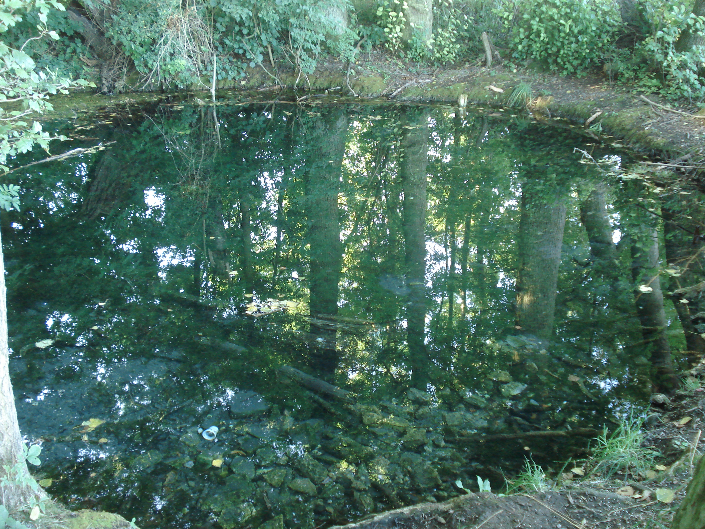 Karstquelle, eine als Naturdenkmal ausgewiesene Gipskarstquelle bei Hofheim in Unterfranken.